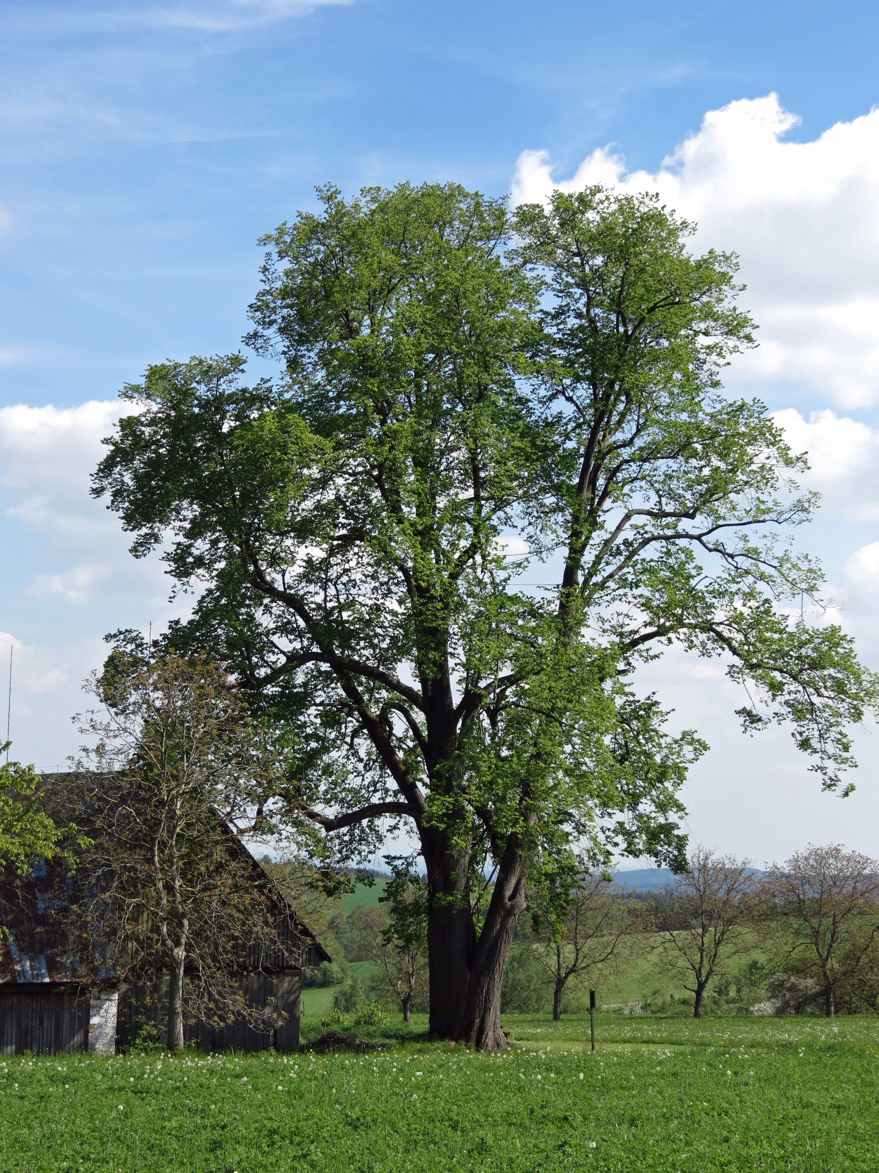 Lípa v Podemládí